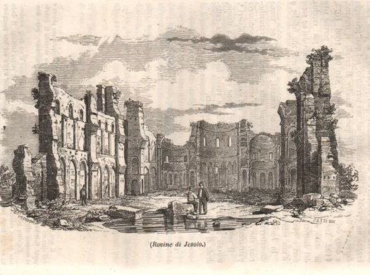 Rovine della cattedrale di Santa Maria Assunta di Jesolo nel 1850 circa